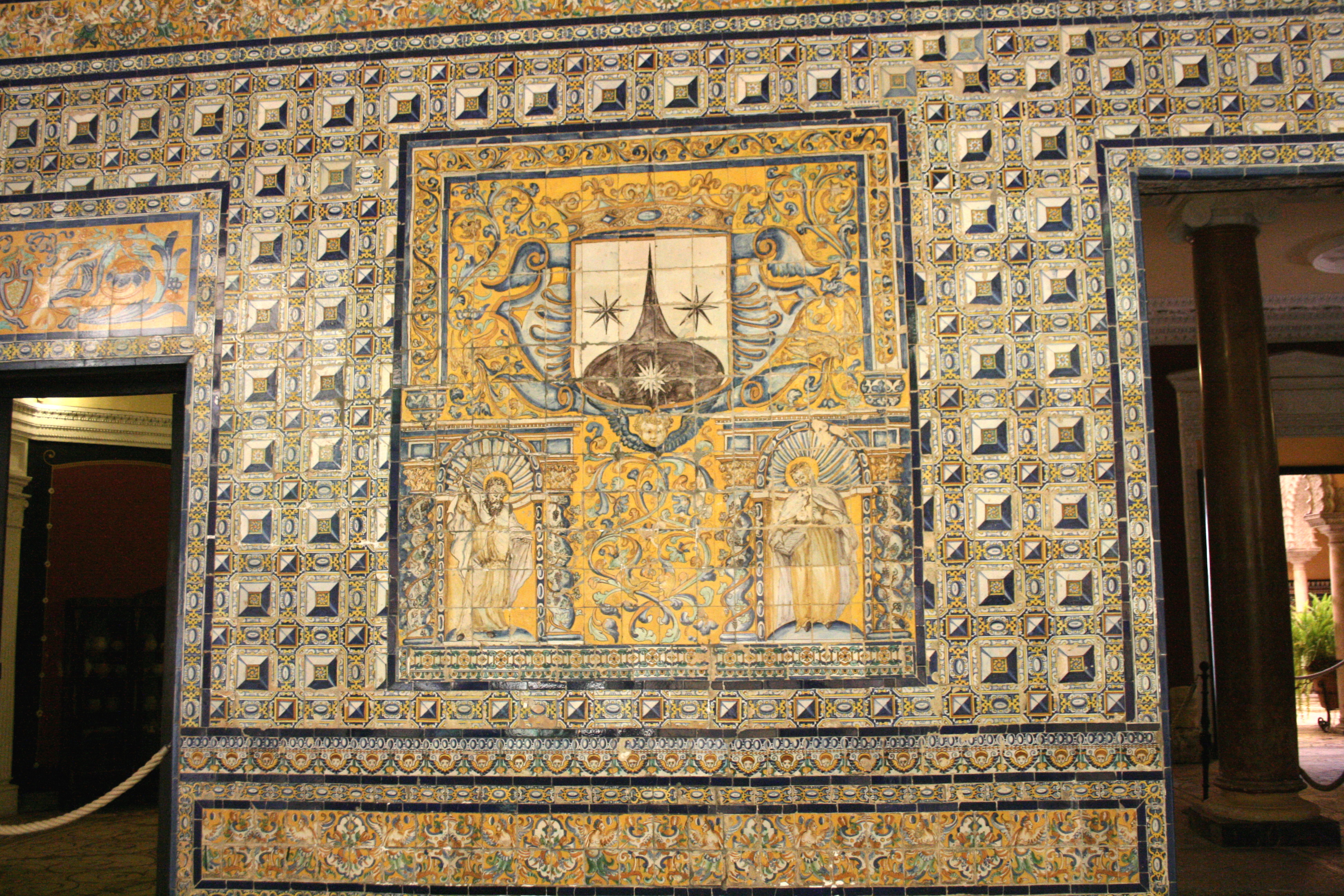 Palacio de la Condesa de Lebrija, Calle Cuna 8, Séville, Espagne. Décoration d'azulejos